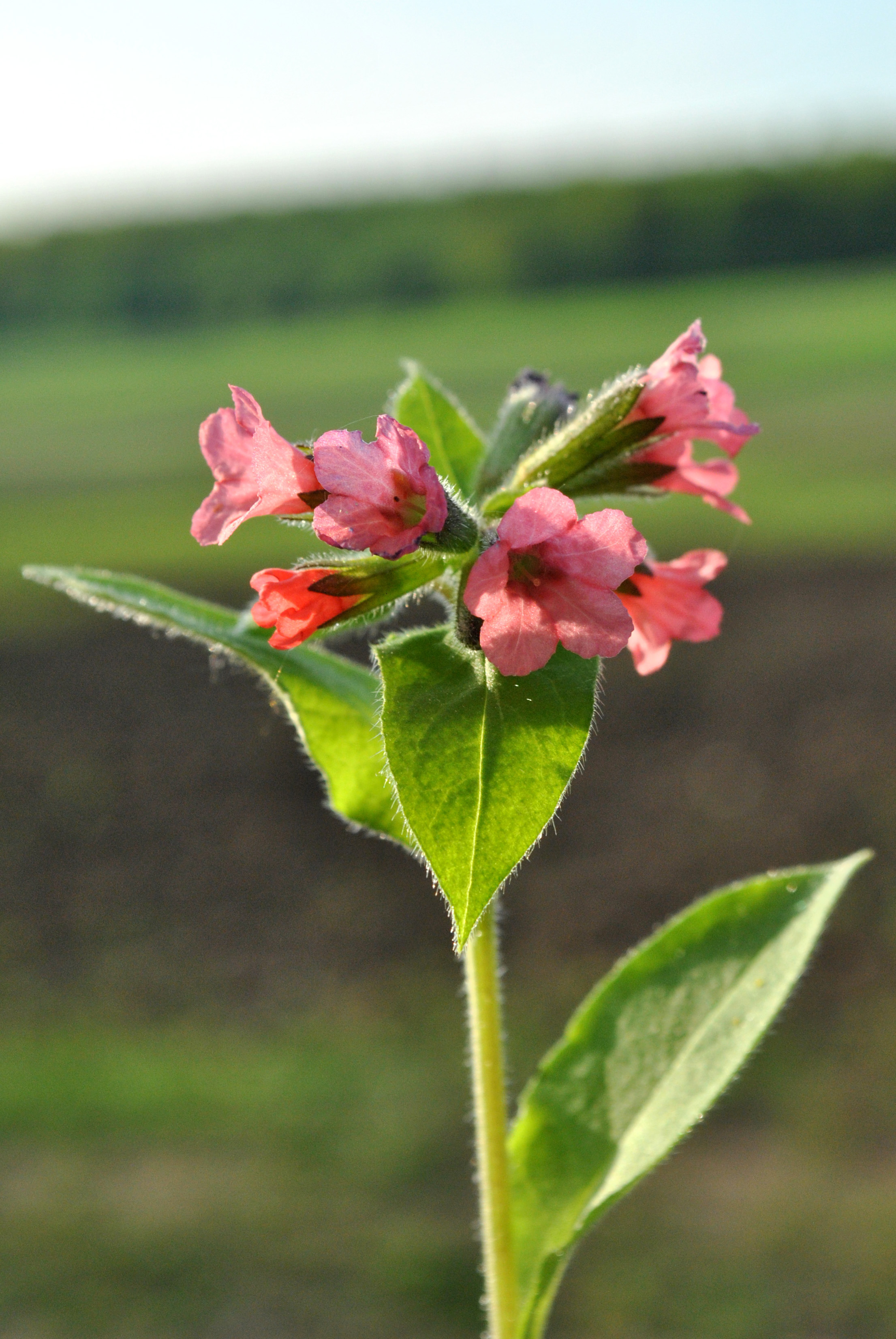 Медунка (Pulmonaria).